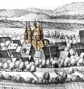 Fürstliches Amtshaus Seesen (Burg Sehusa) von Merian, Amtshaus nachträglich braun eingefärbt